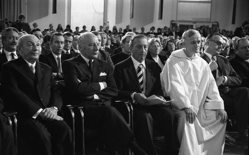 Der Friedenspreis des Börsenvereins des Deutschen Buchhandels wird an den Gründer und Prior der ökumenischen Bruderschaft von Taize, Roger Schütz, durch den Vorsteher des Börsenvereins Dr. Ernst Klett in Anwesenheit von Bundespräsident Walter Scheel in der Pauls-Kirche überreicht. (links: Dr. Max Tau)